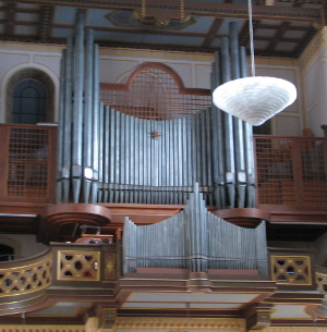 St.-Laurentius-Kirche in Weinheim.